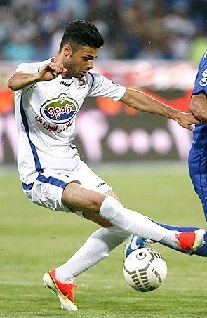 حسین ابراهیمی بازیکن داماش گیلان